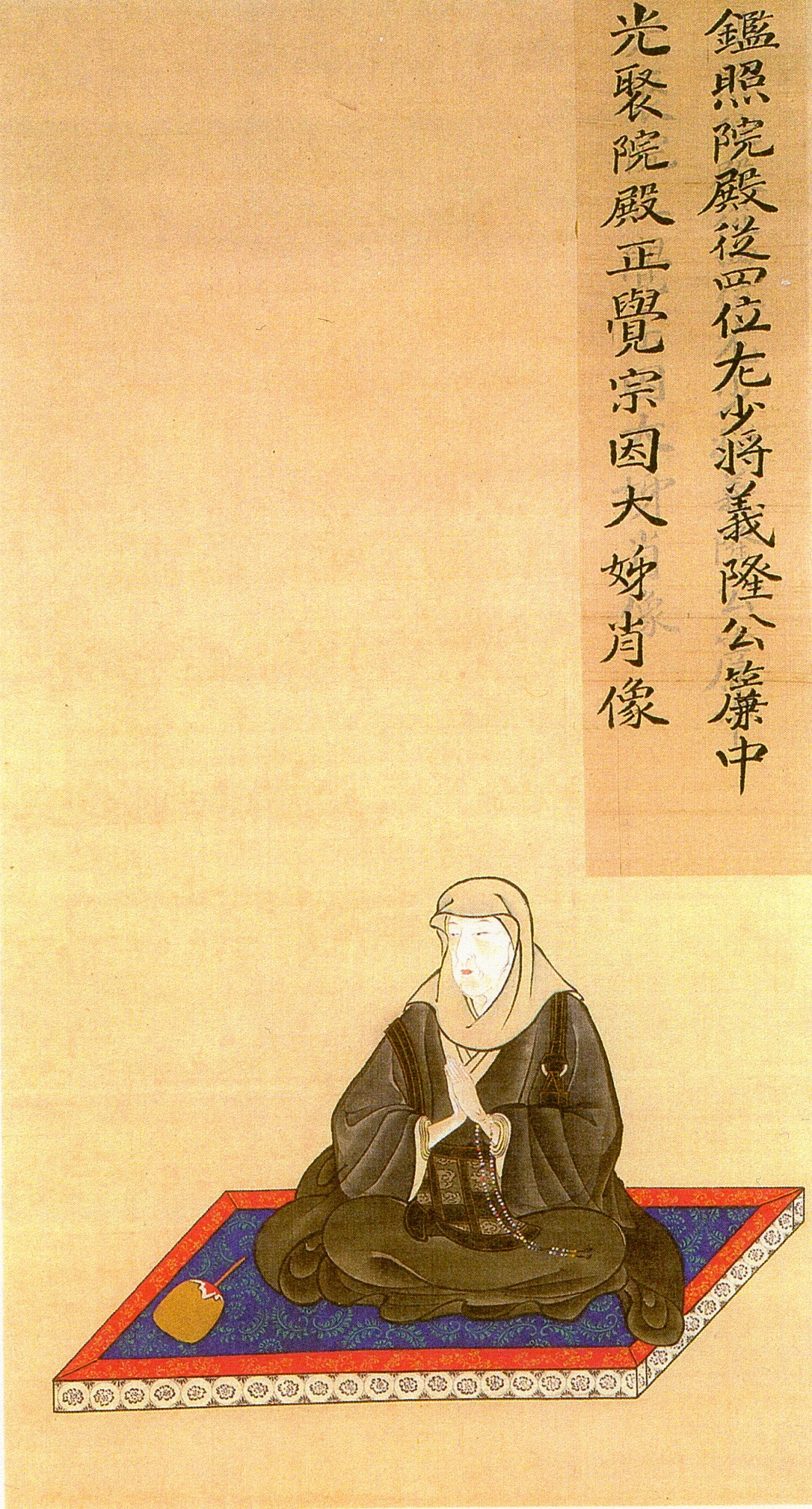 出羽久保田藩2代藩主佐竹義隆の正室・光聚院(寿流姫、佐竹南家4代当主・佐竹義章の長女)の肖像画。